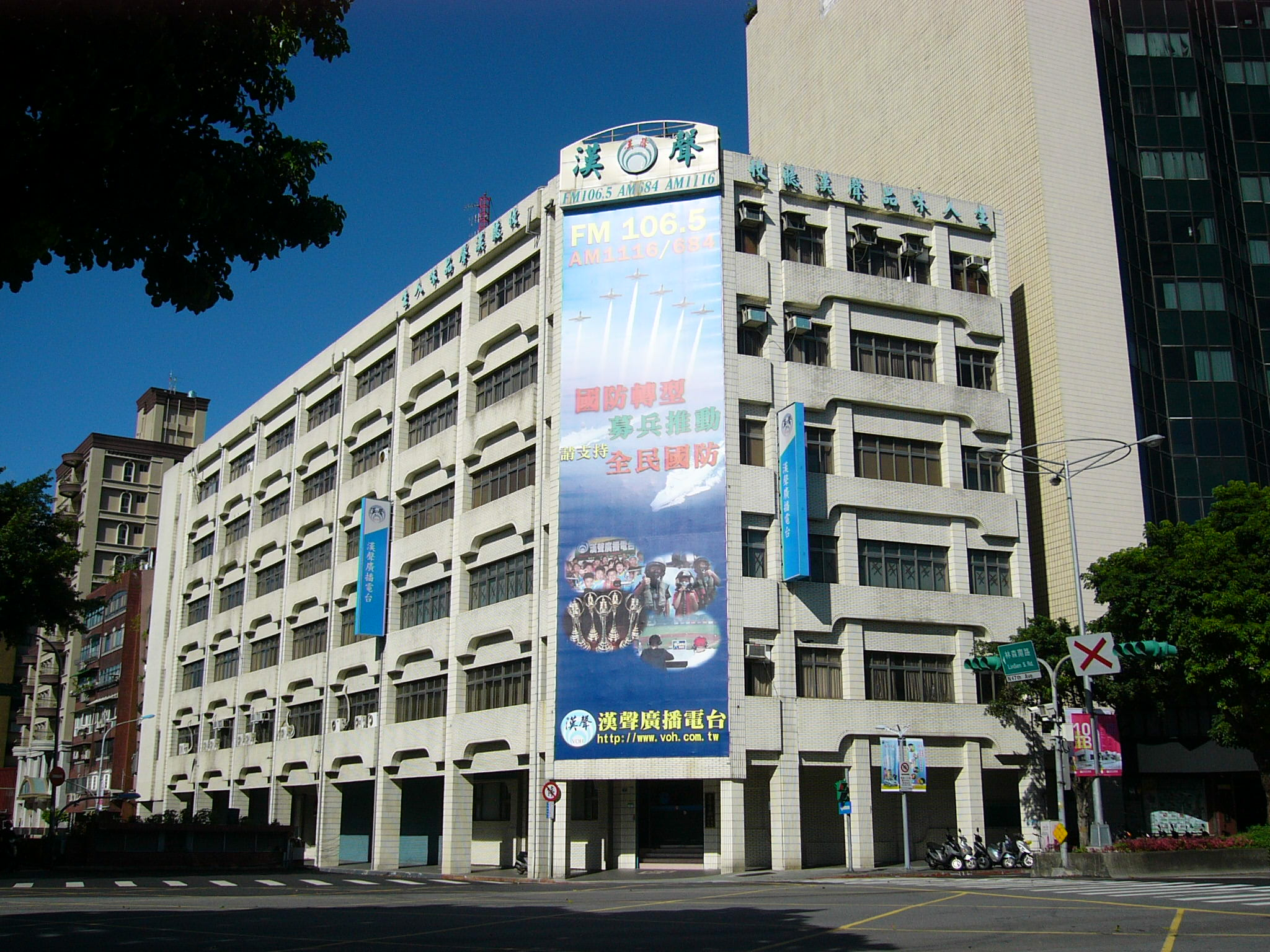 漢聲廣播電台總部與青年日報廣告組及發行組同棟，位於臺北市中正區信義路一段3號。